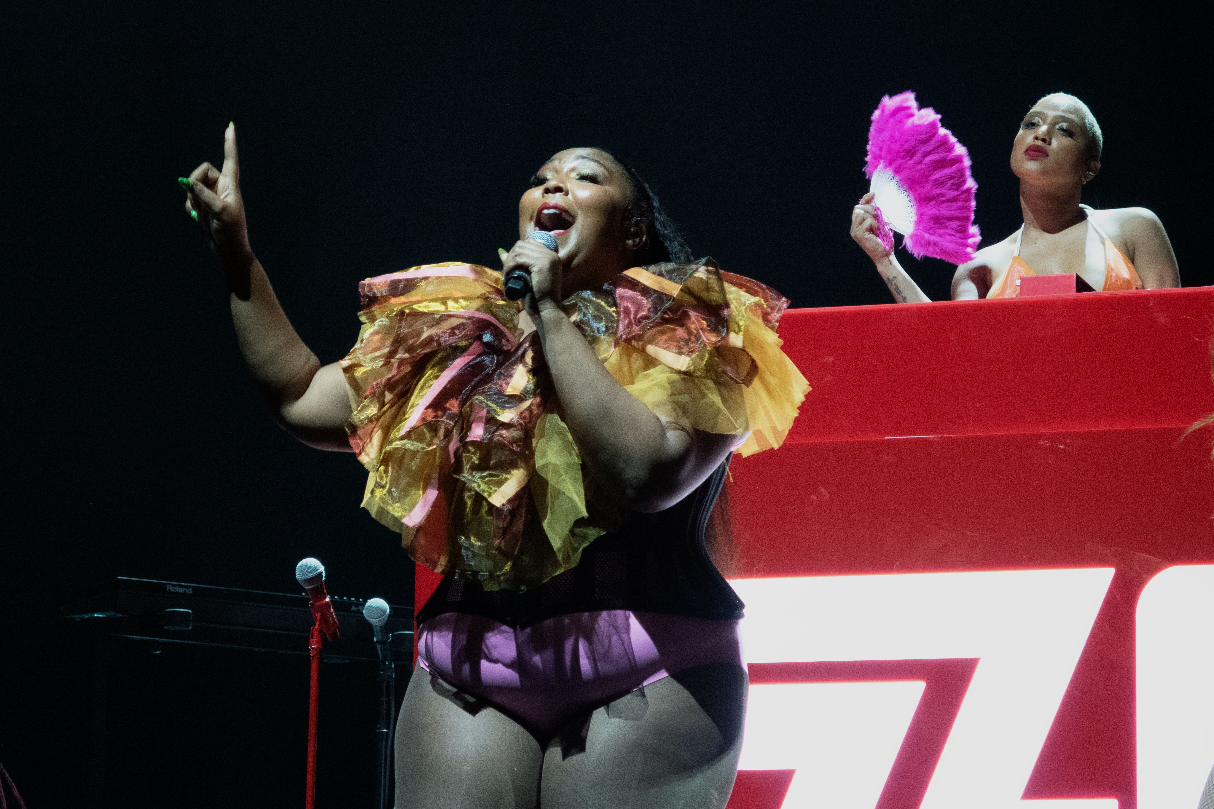 Lizzo